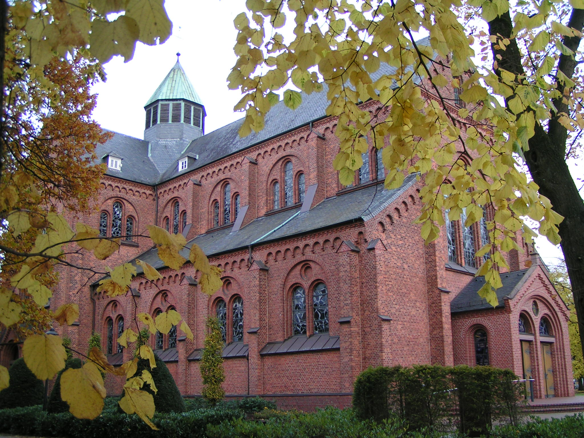 Klosterkirche St. Bonaventura in Mühlen (Gemeinde Steinfeld, Landkreis Vechta). Klosterkirche des Franziskanerklosters in Mühlen